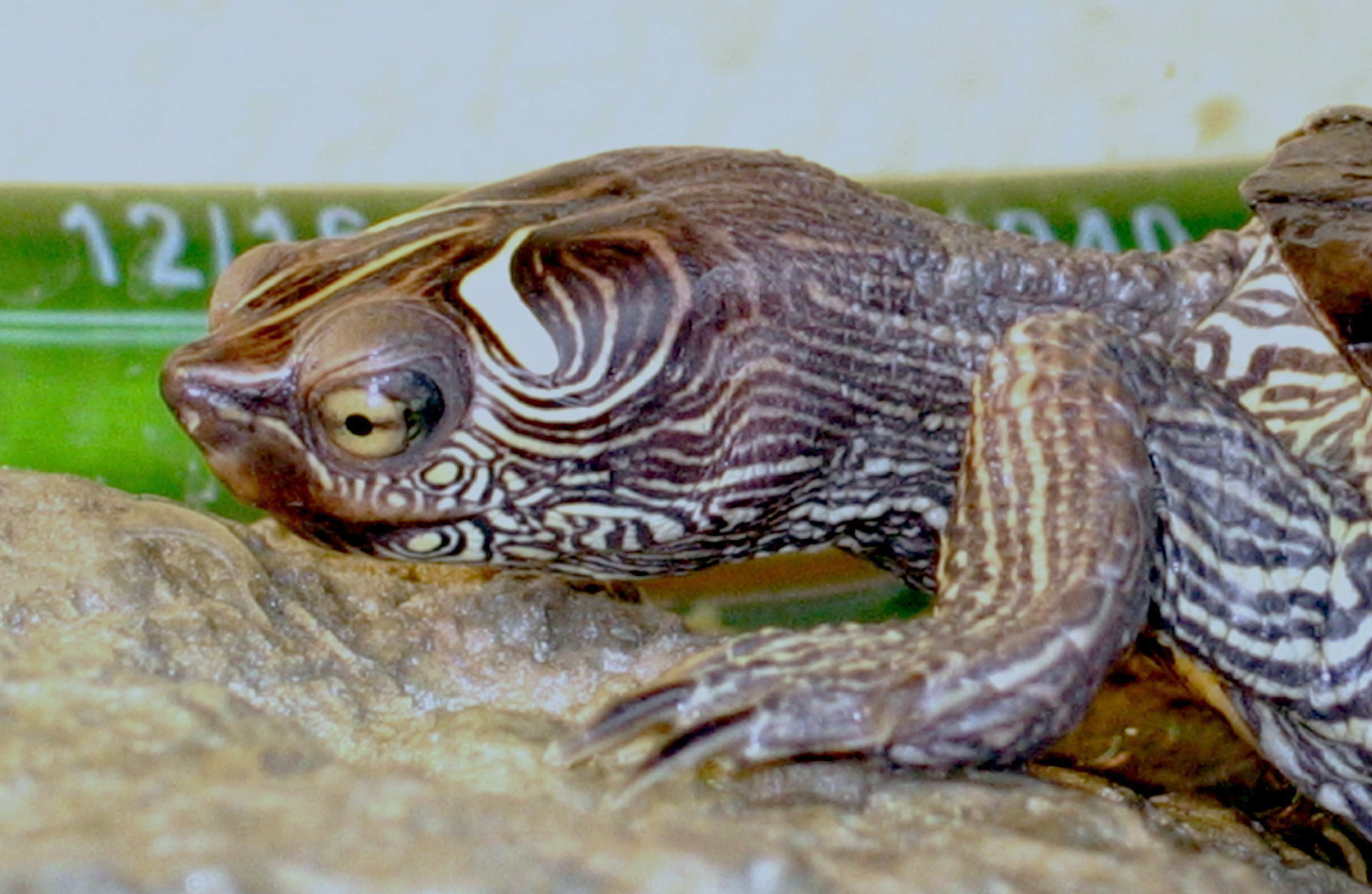 Graptemys pseudogeographica - horizontale Augenstellung